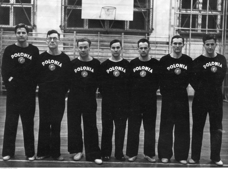 siatkarze